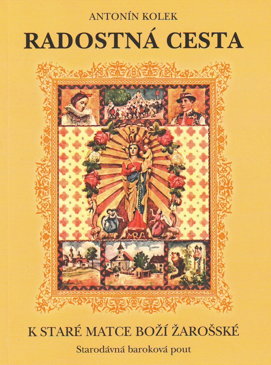 Titulní strana kancionálu Radostná cesta k Staré Matce Boží Žarošské